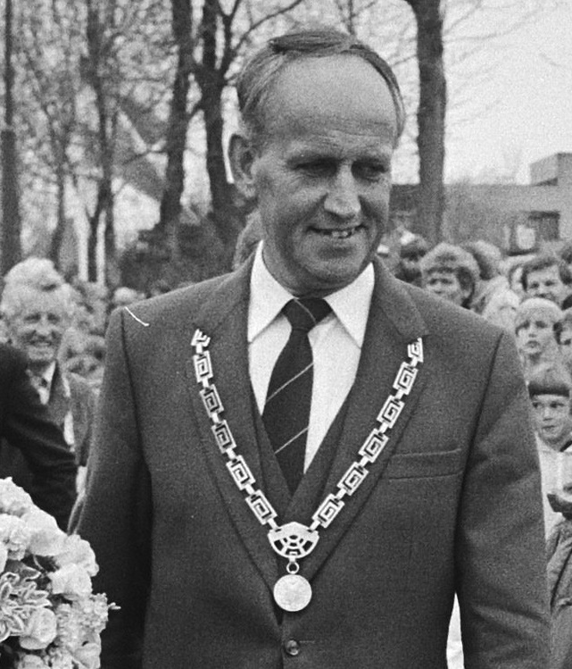 Bert Stam tijdens koninginnedag 1985, Beatrix bezoekt o.a. Schagen